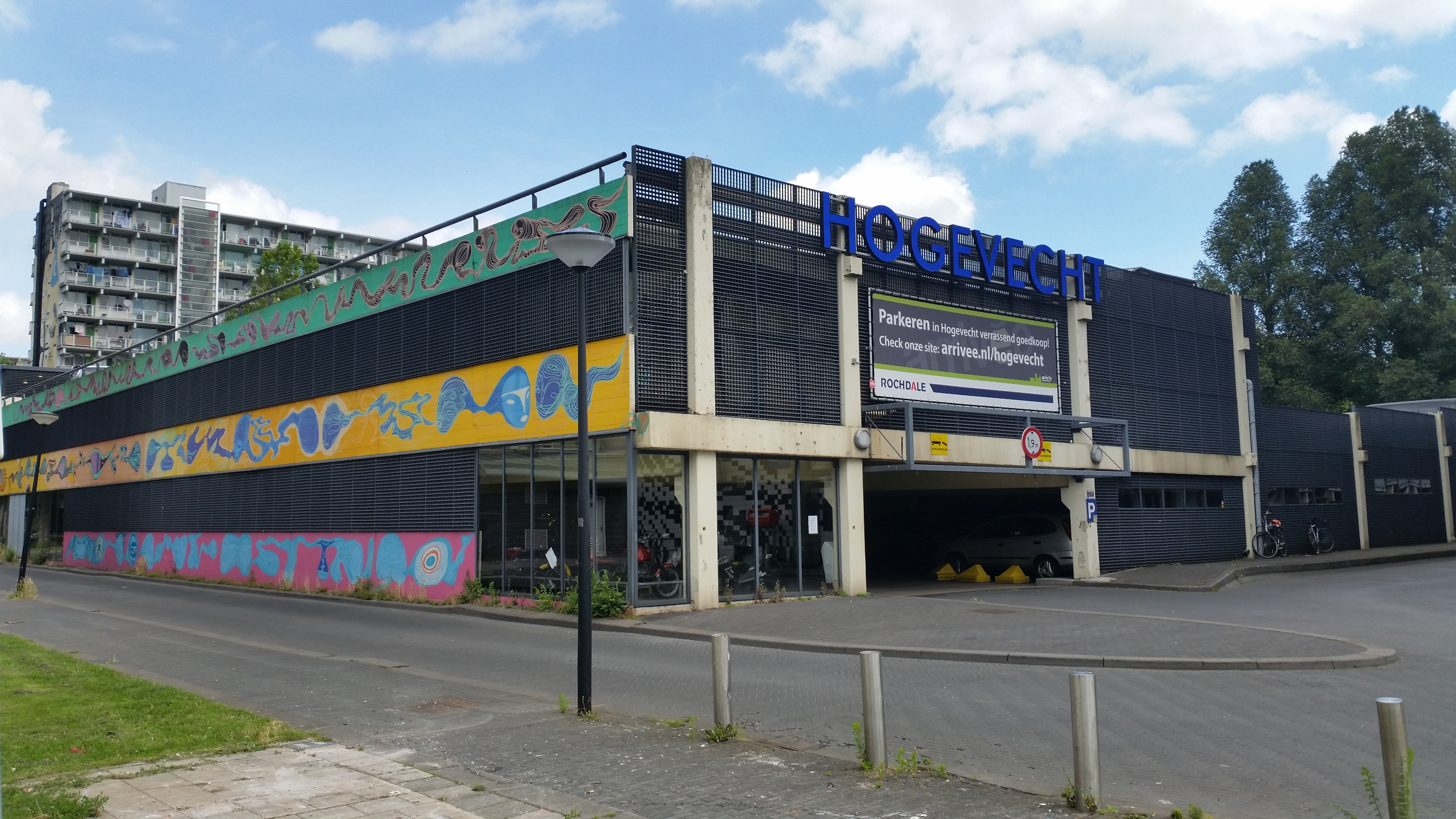 Impressie van flats Hogevecht